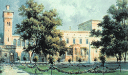 Krongutes Bornstedt, painting by Feodora von Schleswig-Holstein